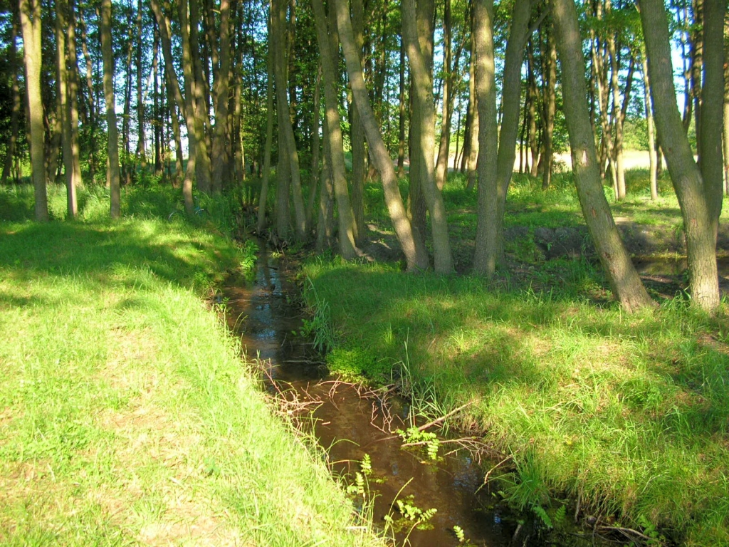 Struga Lisi Ogon na Prądach w Bydgoszczy